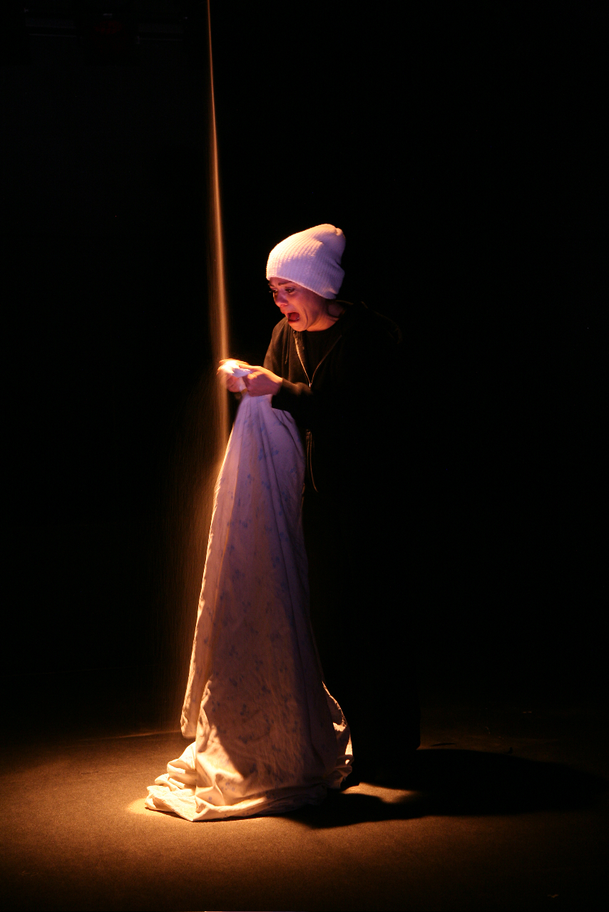 מיקי פלג רוטשטיין בהצגה פשוטה